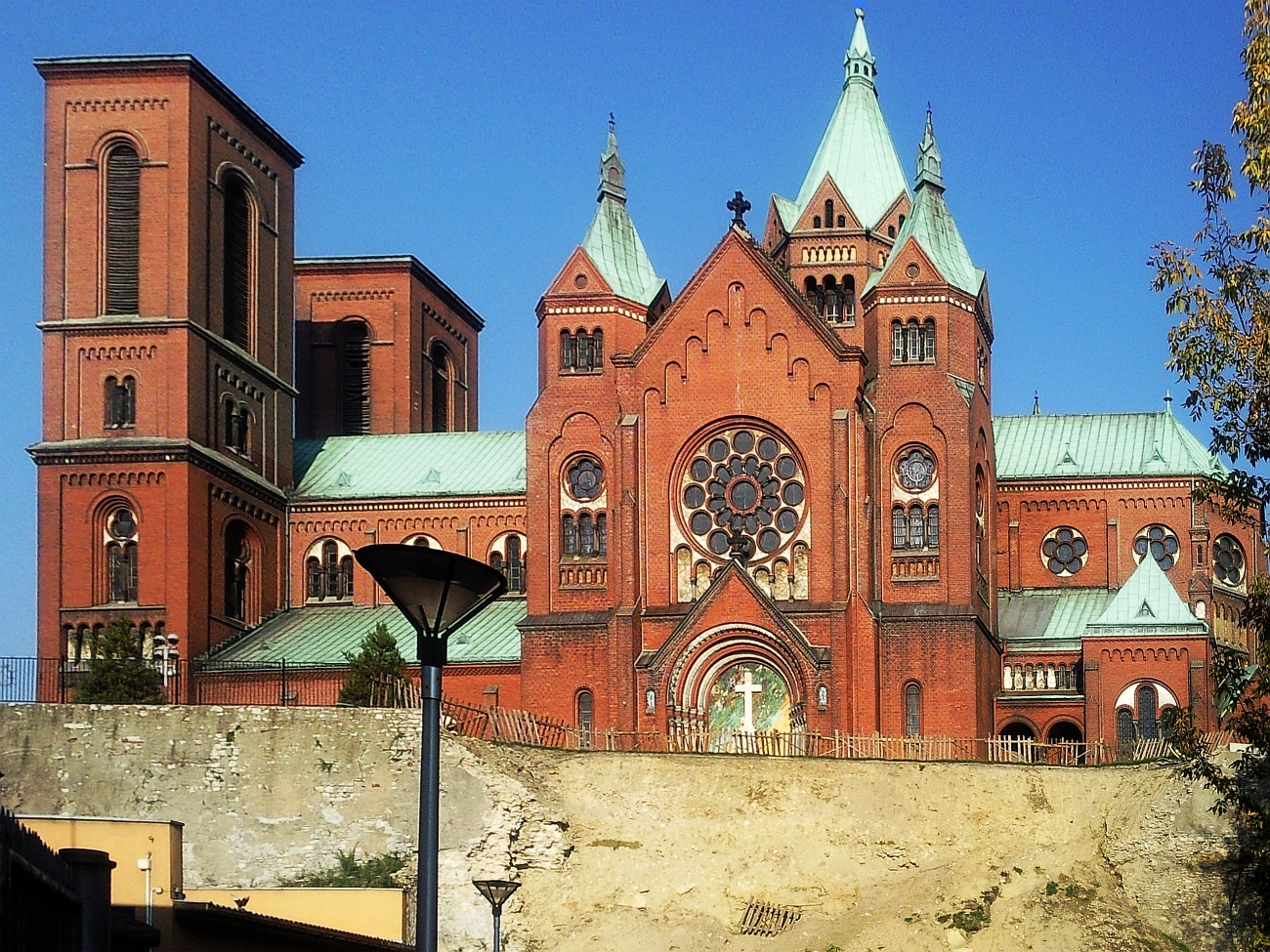 Pierwsza wzmianka o istnieniu parafii pw. św. Stanisława BM w Czeladzi pochodzi z 1260 r. kiedy wspomniany został wtedy tamtejszy kapelan, Stefan. Pierwotnie istniał drewniany kościół, który przetrwał do XVI w., kiedy zastąpiono go murowanym. Była to gotycka, otynkowana świątynia o krótkiej nawie i dłuższym, trójbocznie zamkniętym prezbiterium. Kościół ten po wybudowaniu nowej, okazałej świątyni w 1916 r. został rozebrany. Obecna świątynia o cechach neoromańskich, została wybudowana w latach 1904-1913, według projektu Tomasza Pajzderskiego i Hugo Kudera. Jej uroczystego poświęcenia (konsekracji) kościoła 28 września 1958 r. dokonał biskup częstochowski Zdzisław Goliński. Monumentalny kościół wybudowany został na planie krzyża łacińskiego z wielobocznie zamkniętym prezbiterium oraz wieżami umieszczonymi po bokach transeptu i na skrzyżowaniu z nawą główną oraz przy wejściu. We wnętrzu na uwagę zasługuje m.in. polichromia wykonana w latach 1963-1968 przez Macieja Makarewicza oraz bogata dekoracja rzeźbiarska. W świątyni od XVII w. istnieje kult Matki Bożej Pocieszenia. Dekret zezwalający na publiczne oddawanie czci Najświętszej Maryi Pannie w Jej wizerunku wydał 5 maja 1651 r. biskup krakowski Piotr Gembicki. Kult trwał nieprzerwanie do 1923 r., a jego odnowienie nastąpiło w 1988 r. z udziałem metropolity częstochowskiego Stanisława Nowaka.